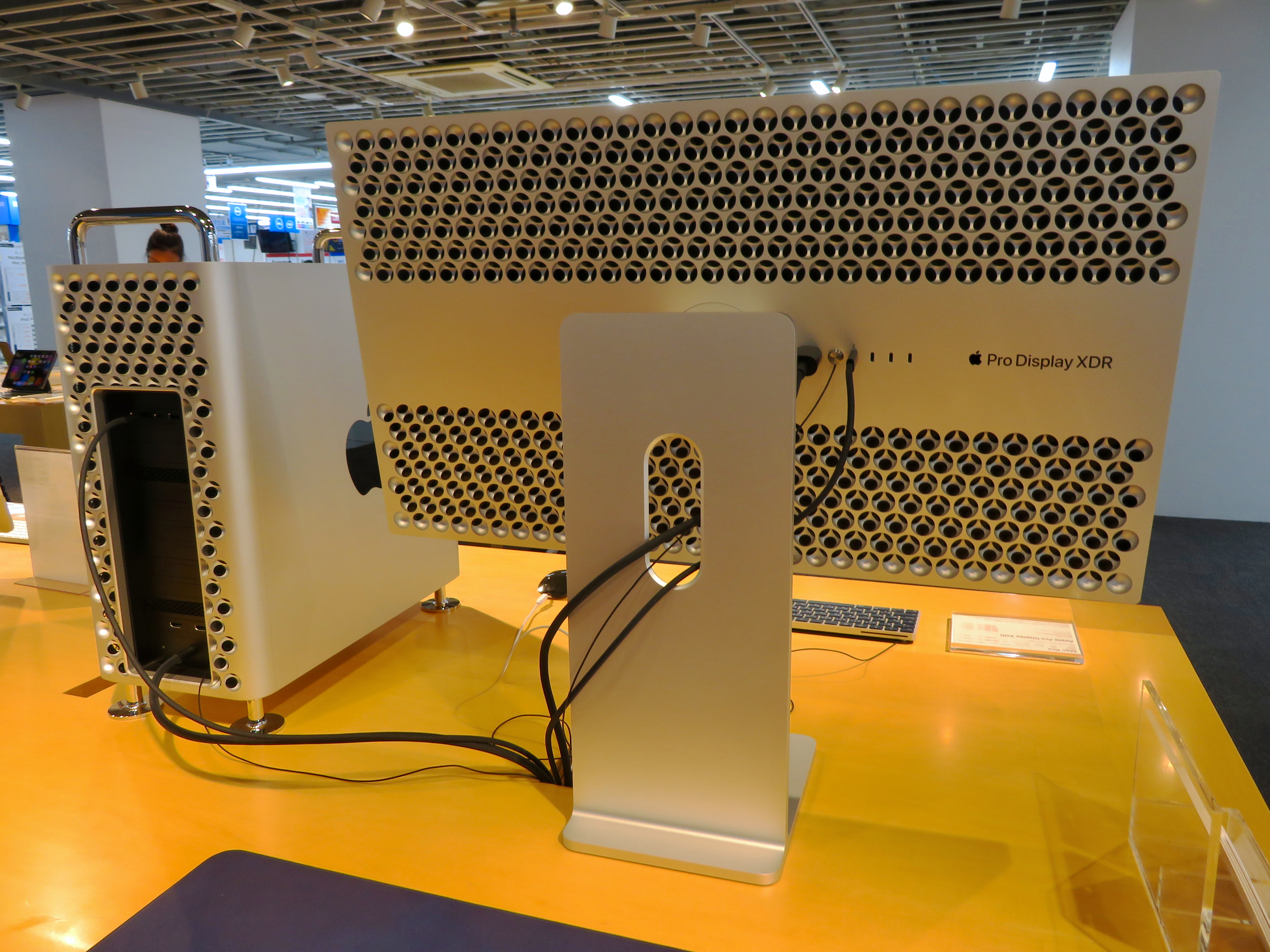 Apple Pro Display XDRとMac Pro（2019年モデル）。名古屋市のビックカメラ名古屋駅西店で撮影。